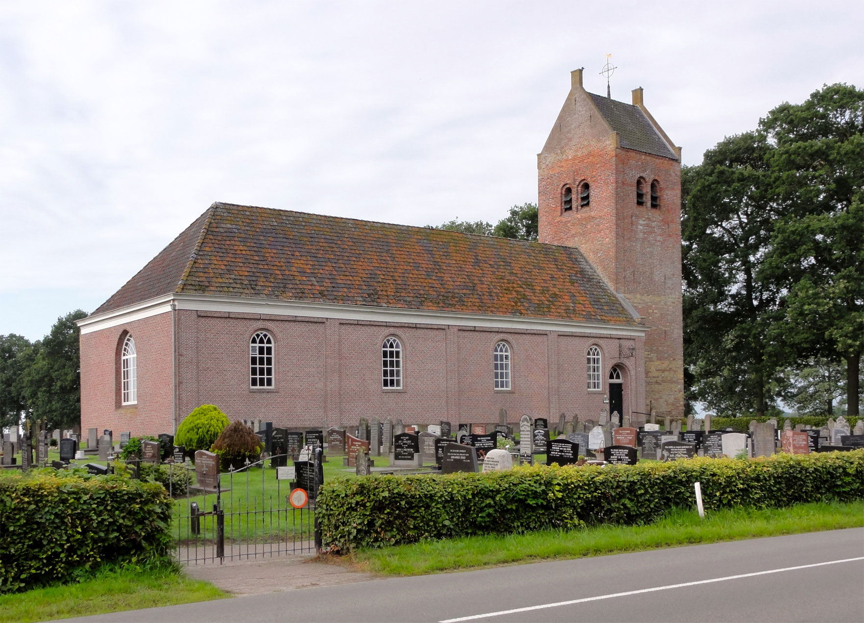 Sint Petruskerk van Ureterp (kerk en toren)